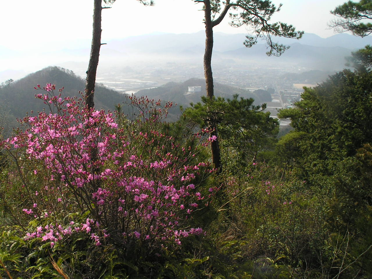 河合雅雄、河合隼雄を産んだ町、篠山。 ～photo by 松岡明芳